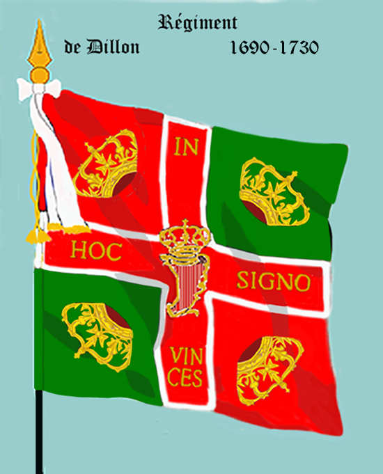 Ordonnanzfahne eines Fremdenregiments im königlich französischen Dienst. - Entnommen und überarbeitet aus: „LES UNIFORMES ET LES DRAPEAUX DE L'ARMÉE DU ROI“ Marseille 1899. (Drapeau d'Ordonnance d' un régiment etranger au service française.)